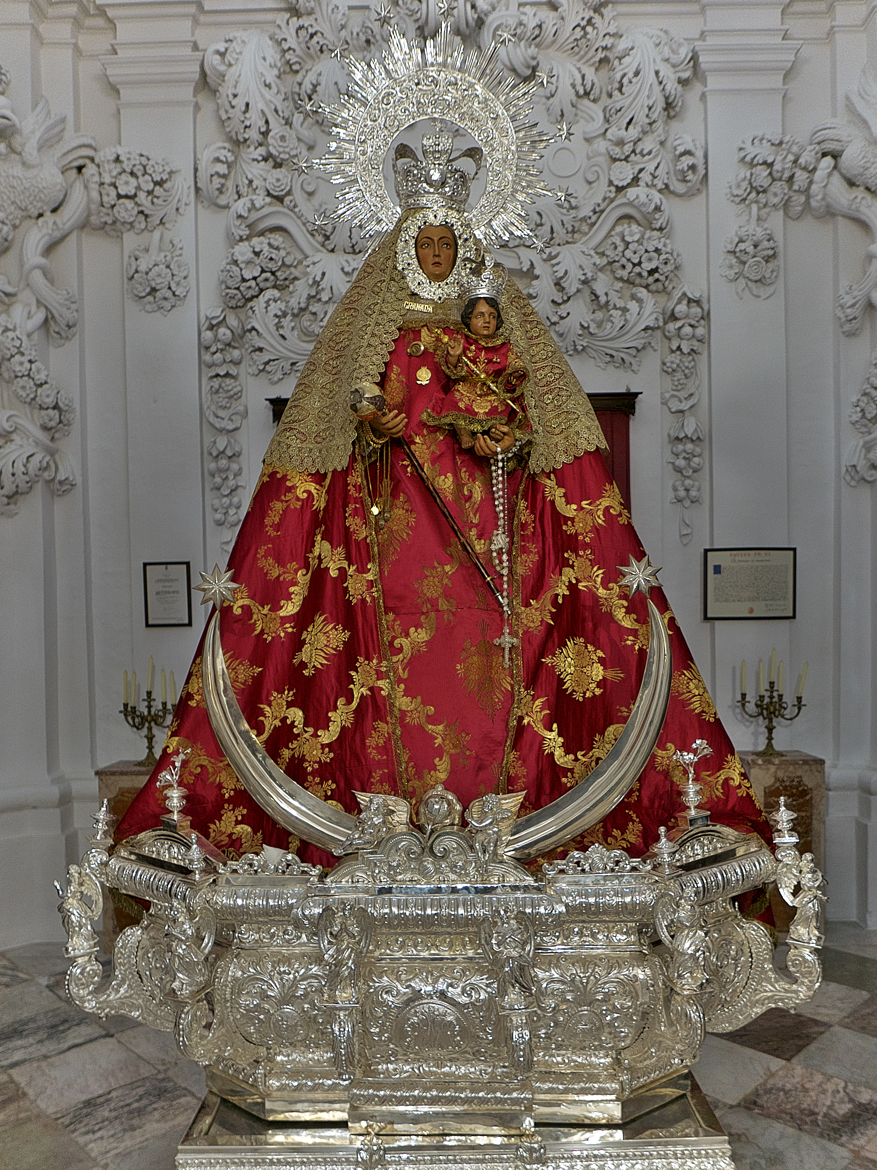 Iglesia Mayor de Nuestra Señora de la Granada. Imagen con orígenes en el siglo XIII, vinculada a la Orden de Santiago.